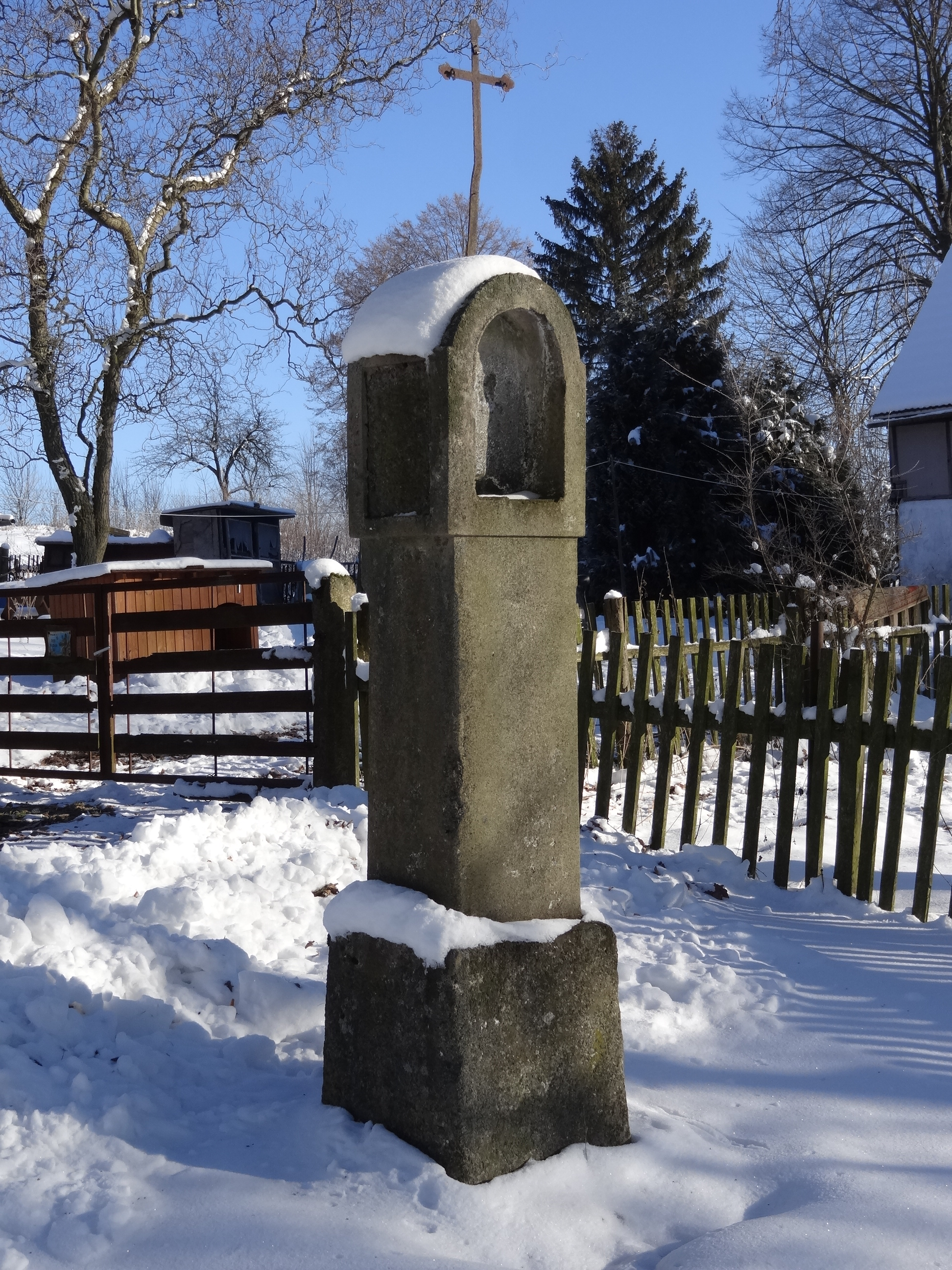 Loučná (na Frýdlantsku) - boží muka západně od čp. 32